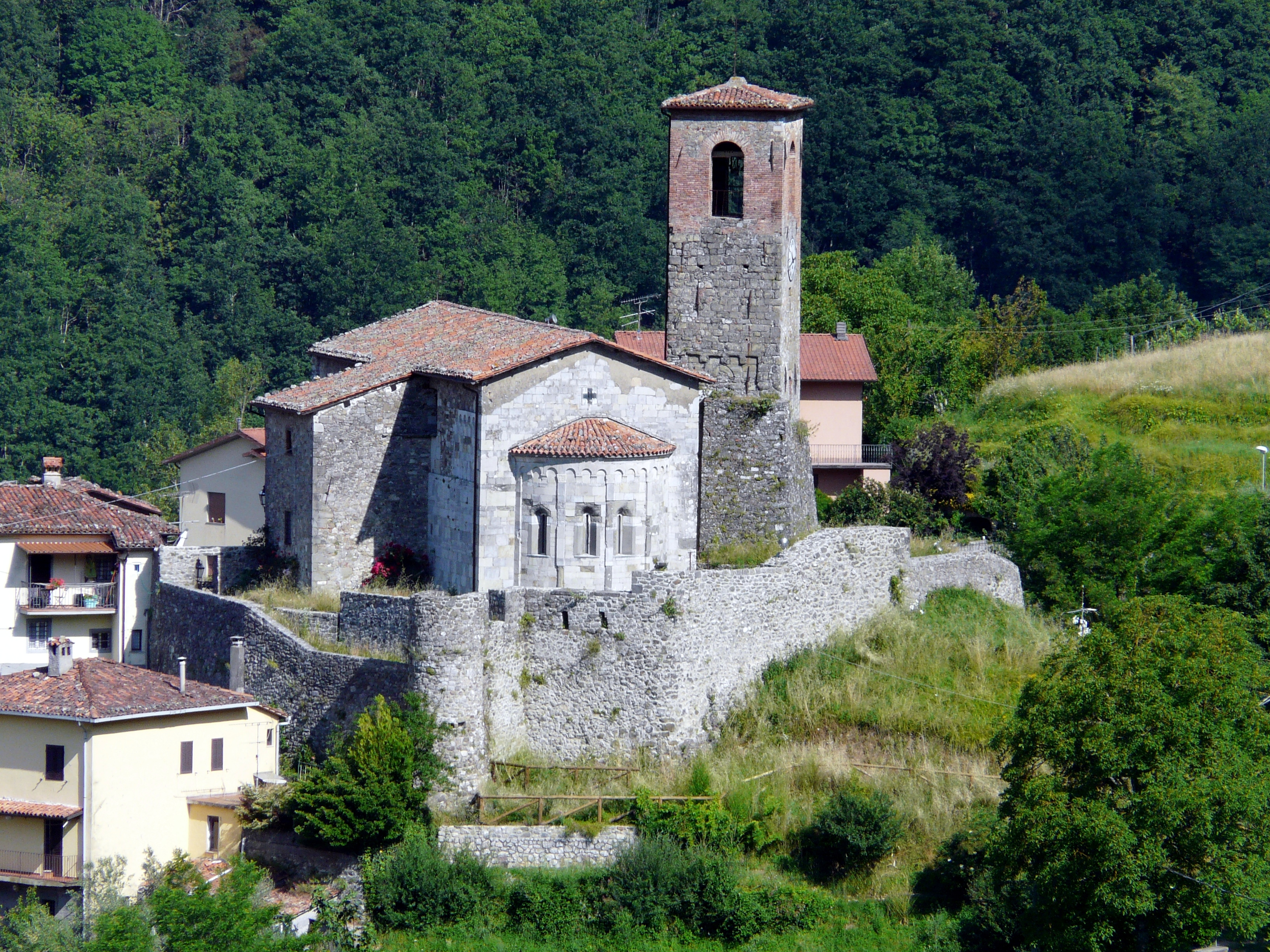 Chiesa di Sant'Andrea, Ceserana (Fosciandora), Toscana, Italia